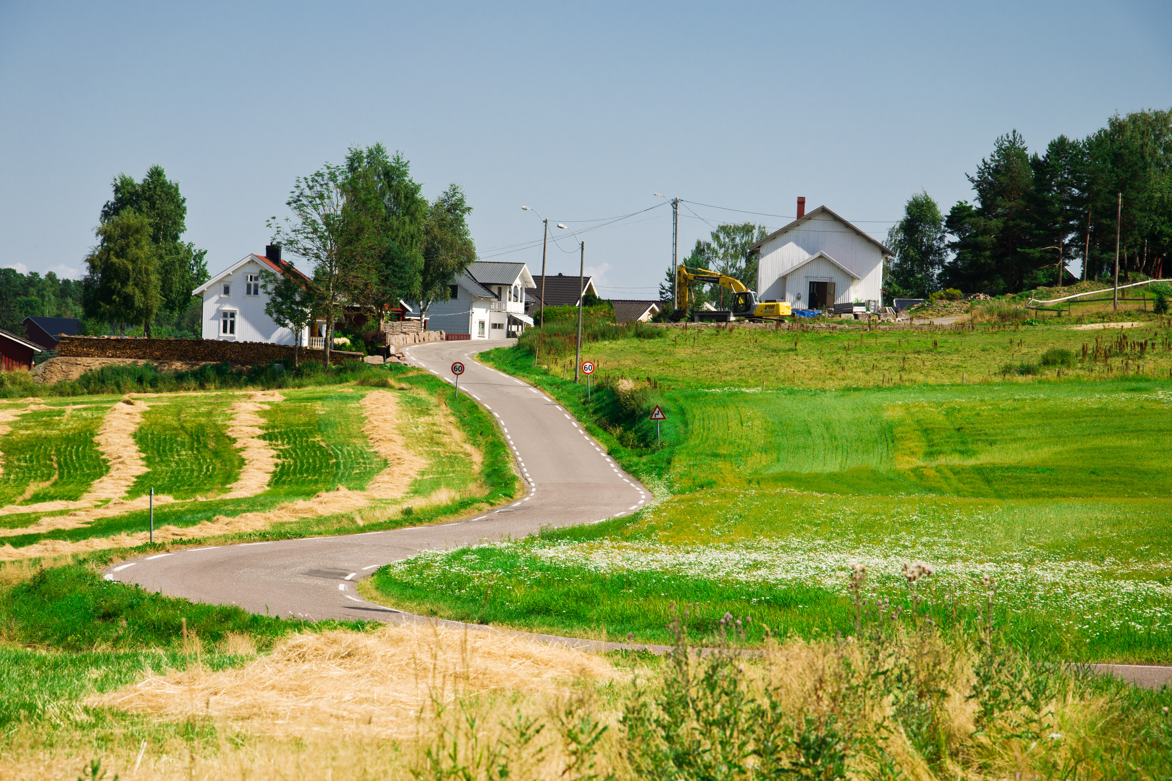 Fylkesvei 805 Heianveien i Re, Vestfold, Norge